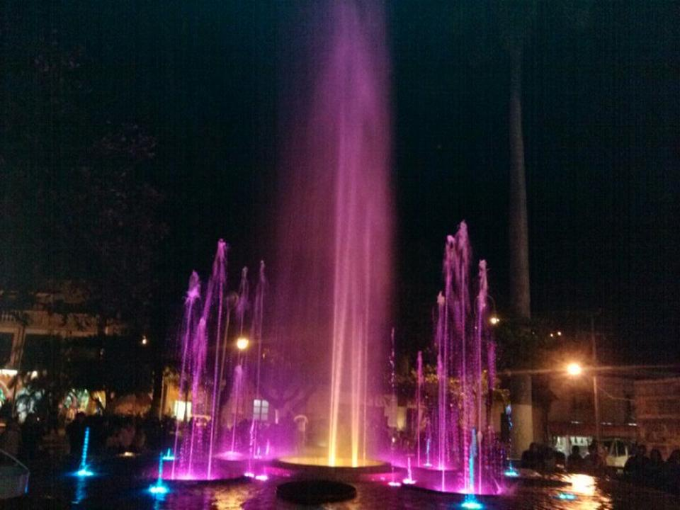 Fuente de Tantoyuca (noche)